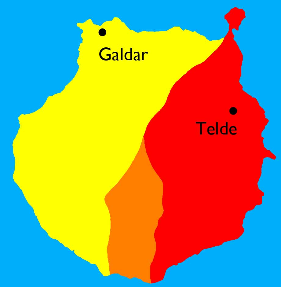 Teilung der Insel Gran Canaria in die Guanartematos Galdar (gelb) und Telde (rot) der orange dargestellte Bereich wird in den Chroniken unterschiedlich zugeordnet. Vorlage: Julio Cuenca Sanabria, Carlos García, Guillermo Rivero: El guanertemato de Telde, en la prehistoria de Gran Canaria. In: Aguayro. Nr. 176, 1988, S. 33